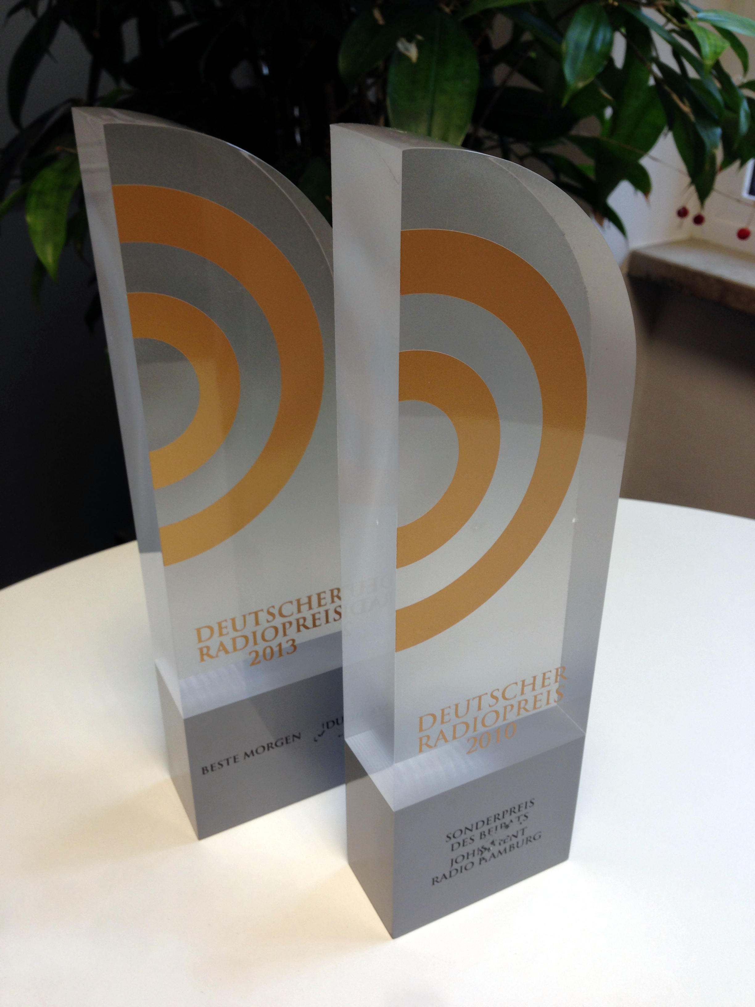 Deutscher Radiopreis: Die bisherigen Auszeichnungen für den Sender Radio Hamburg: Sonderpreis John Ment (2010) Beste Morgensendung (2013)